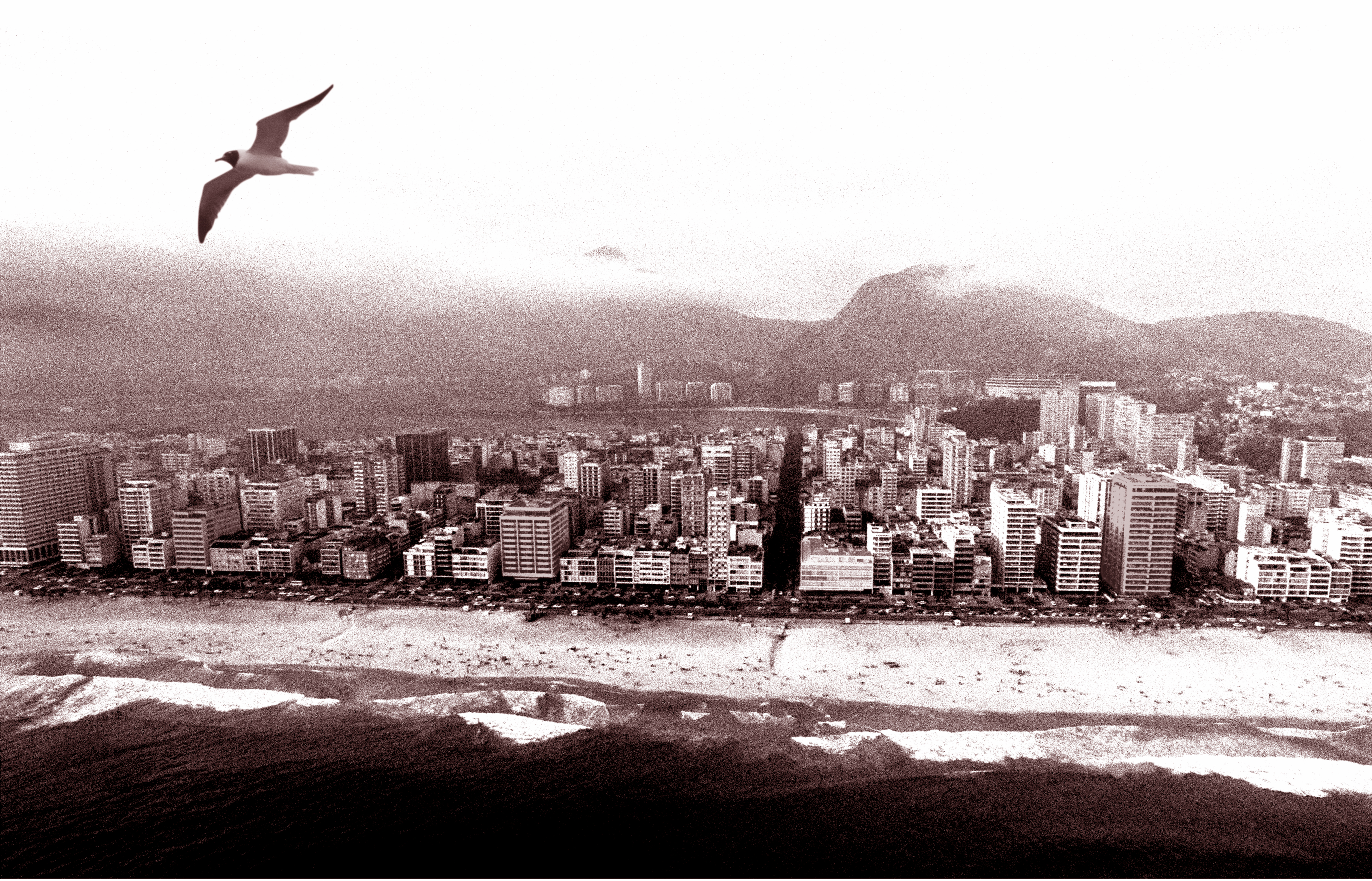 Rio de Janeiro - Avenida Vieira Souto - Lagoa Rodrigo de Freitas, Chroicocephalus maculipennis. Recording Film Iso 1000 Referencia Enciclopédia Itaú Cultural